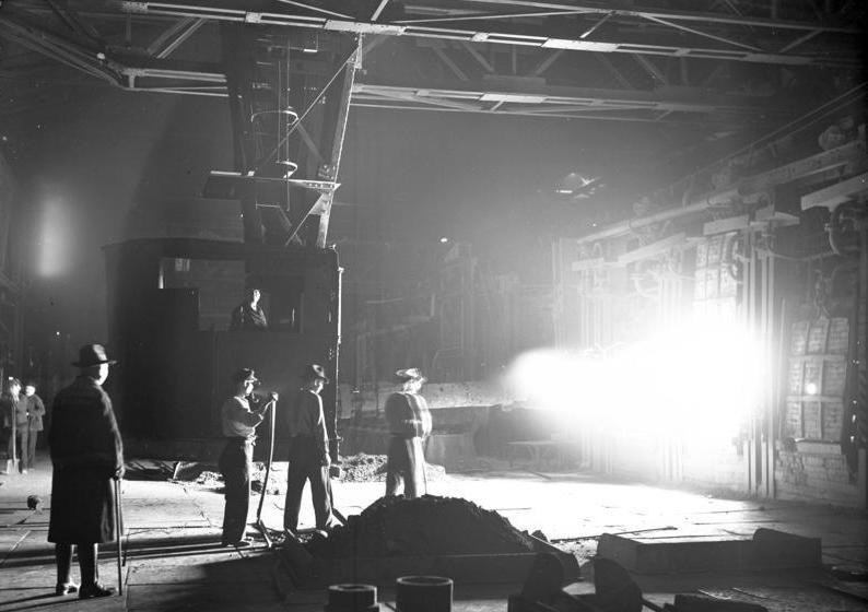 Julienhütte/ Oberschlesien Abstriche und Abgüsse